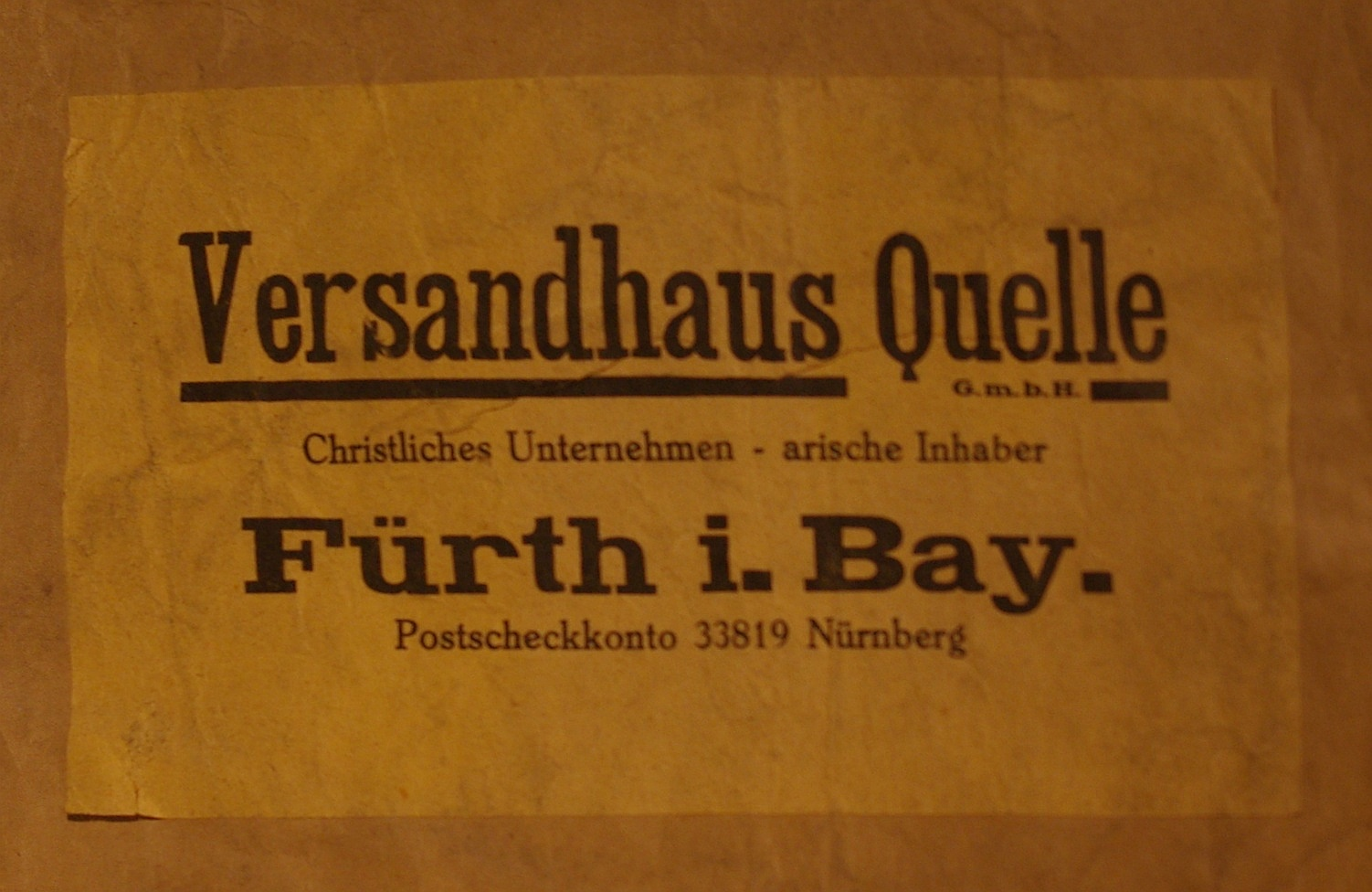 Verpackungsaufkleber des Versandhauses Quelle GmbH aus den 1930er oder 1940er Jahren, ausgestellt im Jüdischen Museum Franken